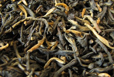 Dian hong gongfu (Yunnan gold) tea